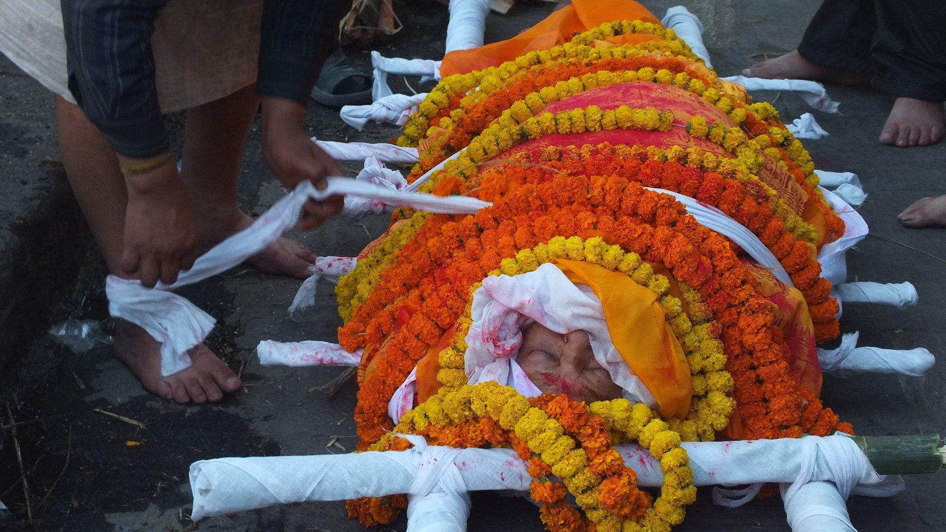 Bagmati River, Pashupatinath, Nepal バグマティ川とパシュパティナート火葬場